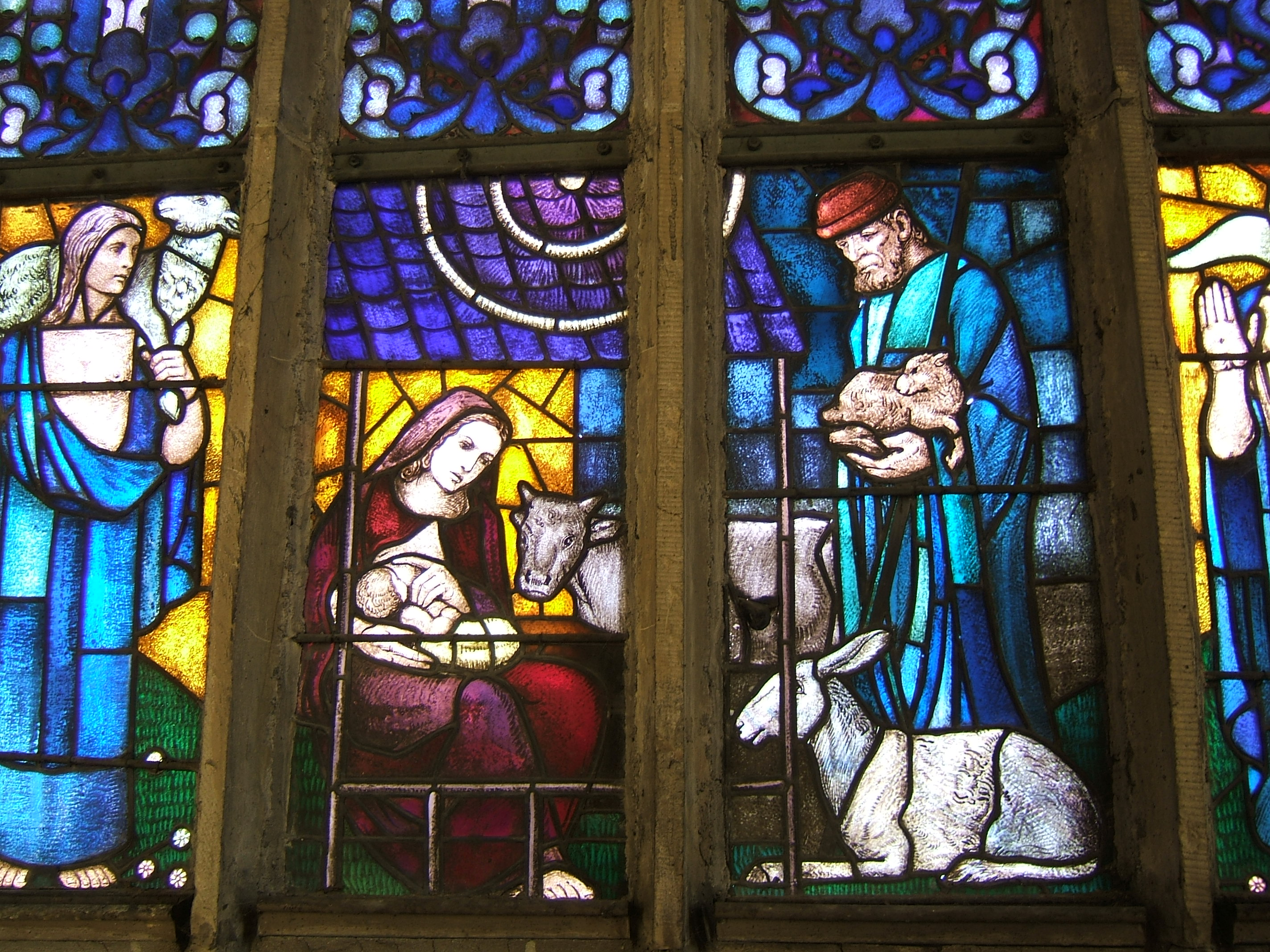 St.-Veit-Kirche Gärtringen, Jugendstil Glasmalereien im Achsenfenster des Chores, die mittleren beiden thematisieren die Geburt Christi, 1913 von Eduard Pfennig